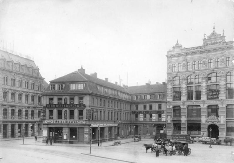 Berlin 1889, Der Hausvogteiplatz, anstelle der Bastion III der Memhardtschen Festungsanlagen des 17. Jahrhunderts, entwickelte sich zum Zentrum des Konfektionshandels. Blick auf die Westseite des Platzes mit der Einmündung de Mohrenstraße (l.). Aufnahme: F. Albert Schwartz 4474-49